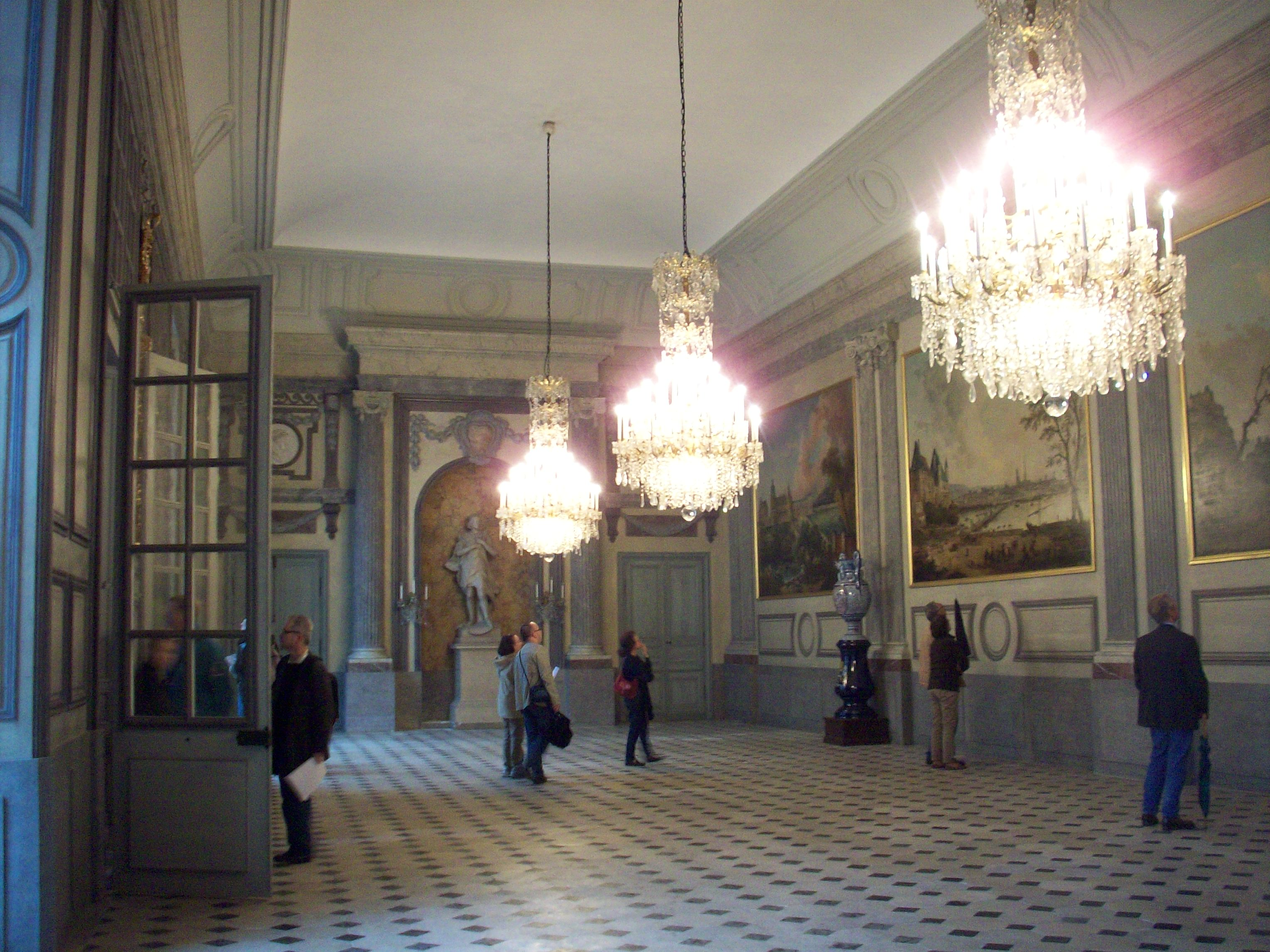 Salle des Etats de Normandie ou salle des Etats.